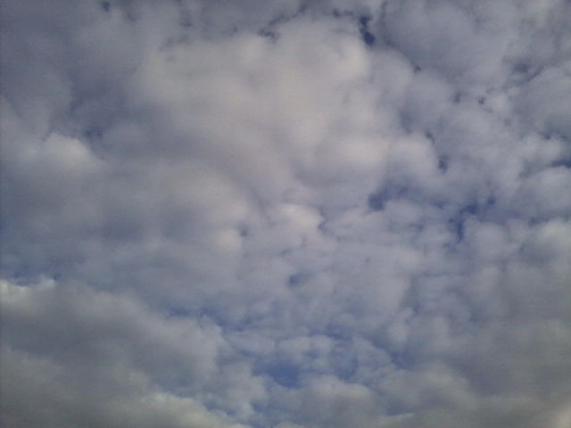 Un manto de estracúmulos cubriendo el oeste del Gran Buenos Aires